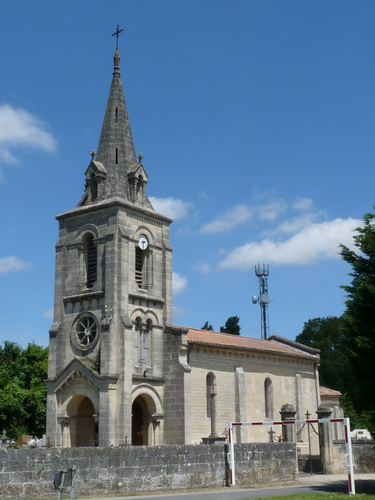 Eglise de Virsac, Gironde, France